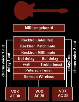 efekty red special